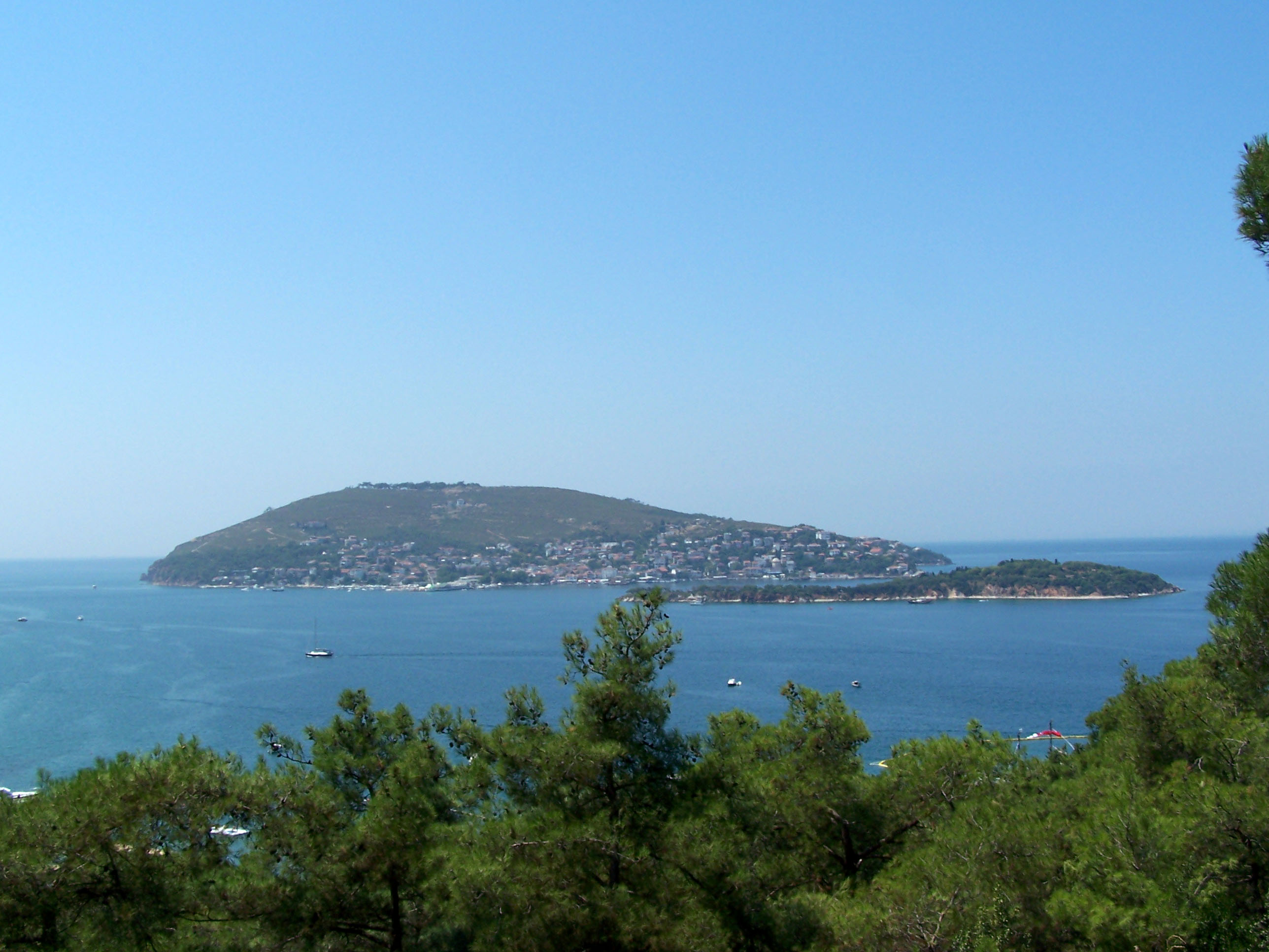 Burgazada seen from Heybeliada, Turkey